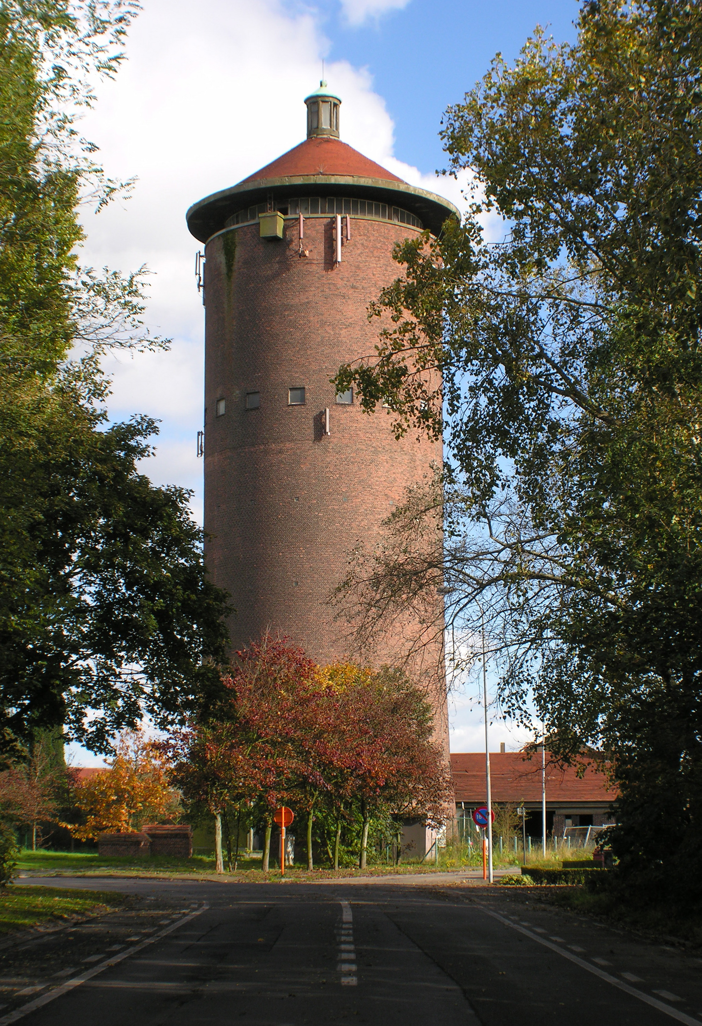 Water Tower in Zelzate.